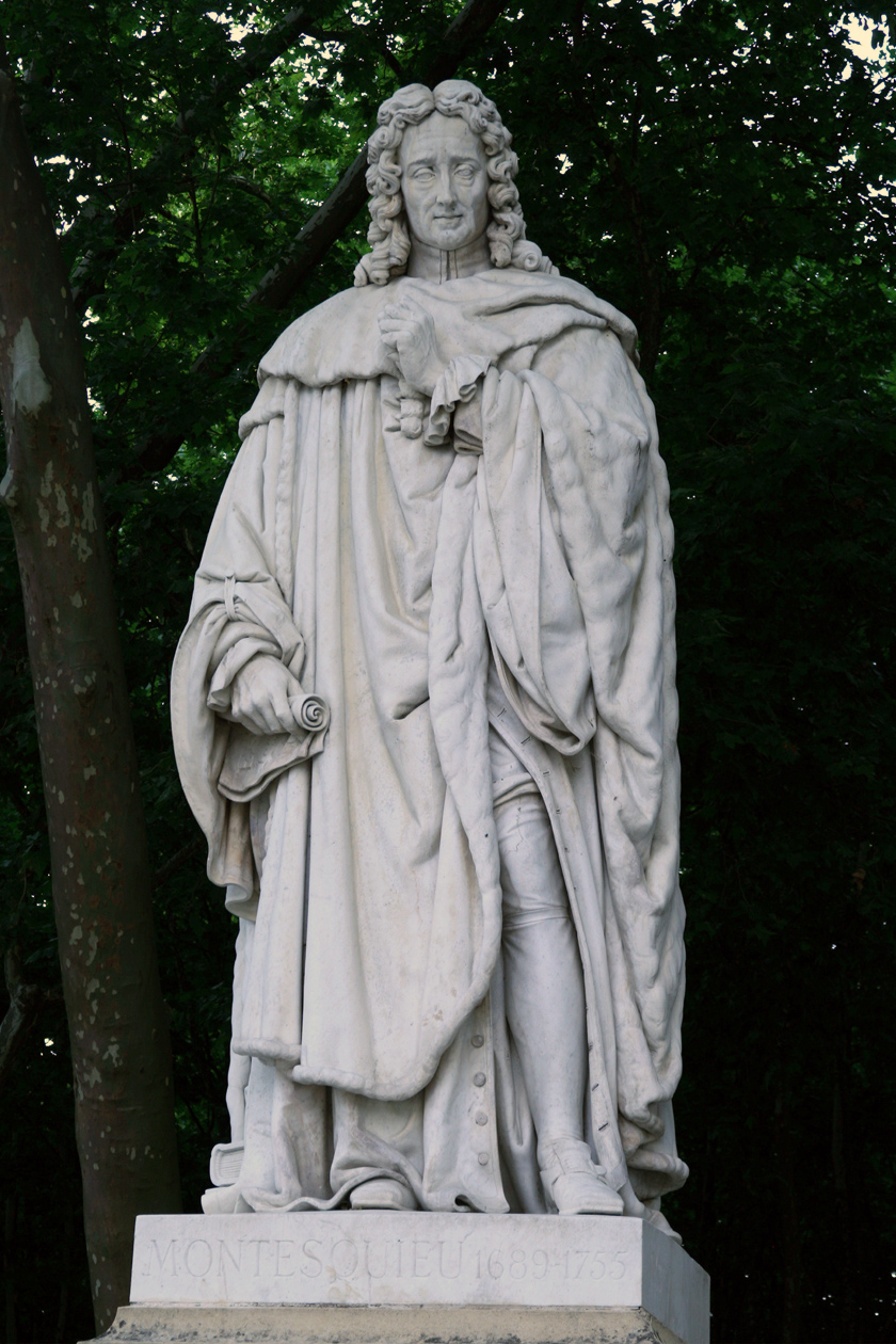 Statue Montesquieu à Bordeaux